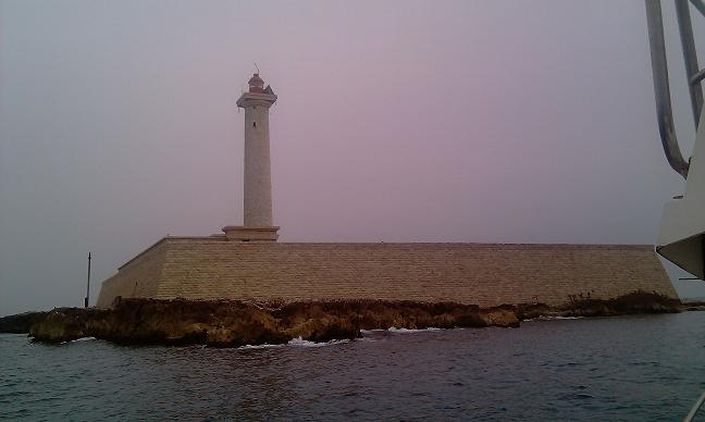 Phare de Planier, photo prise de la Anse Ouest